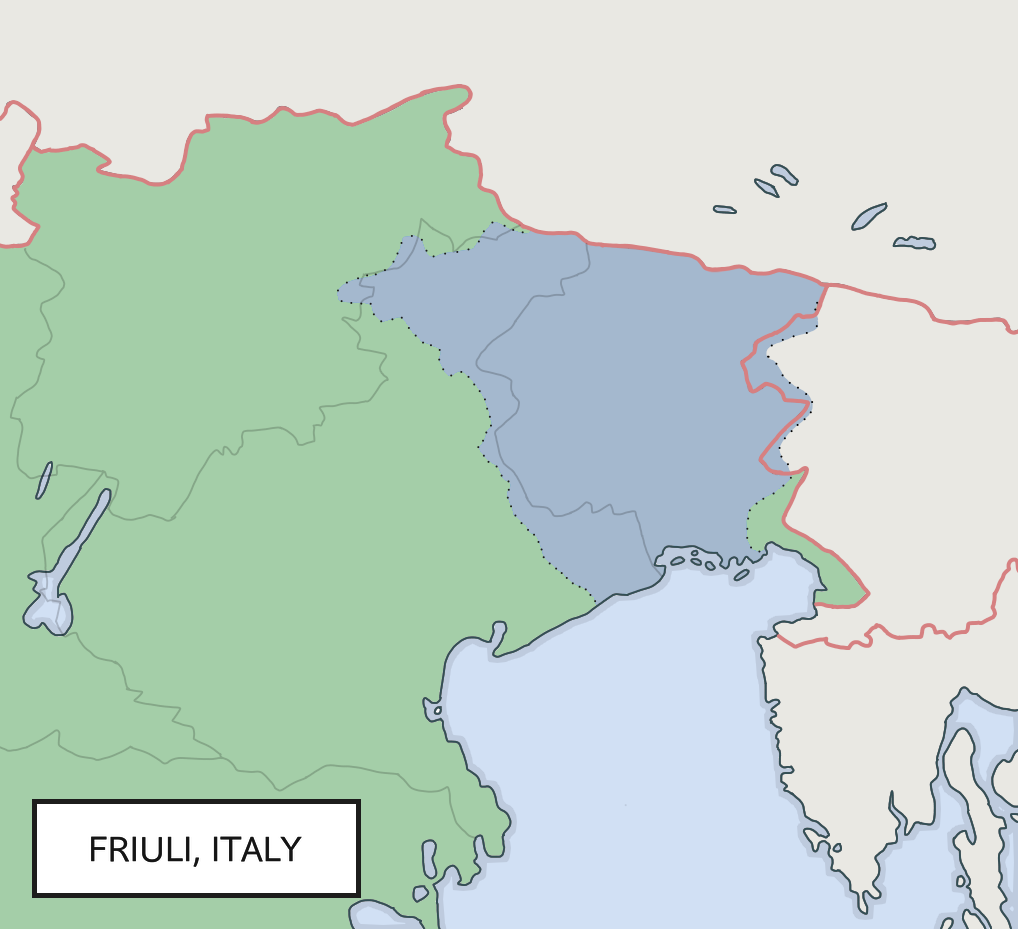 Furlan: Imagjine dal Friûl inte Europe